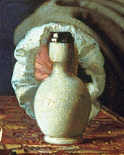 Vermeer Le Verre de vin detail du pichet